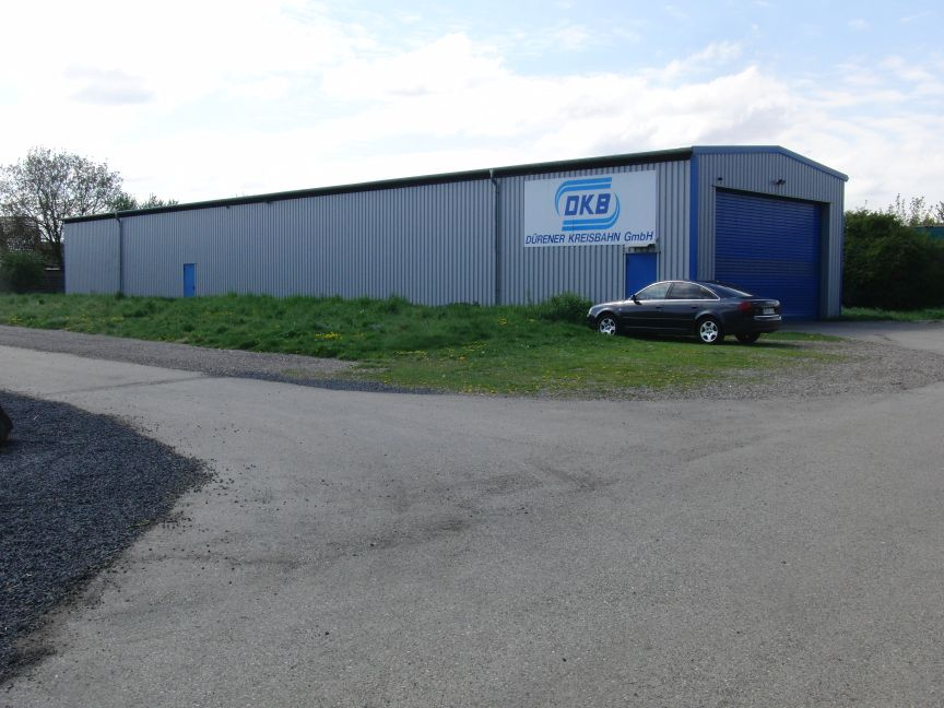 DKB-Betriebshof Nörvenich 2014